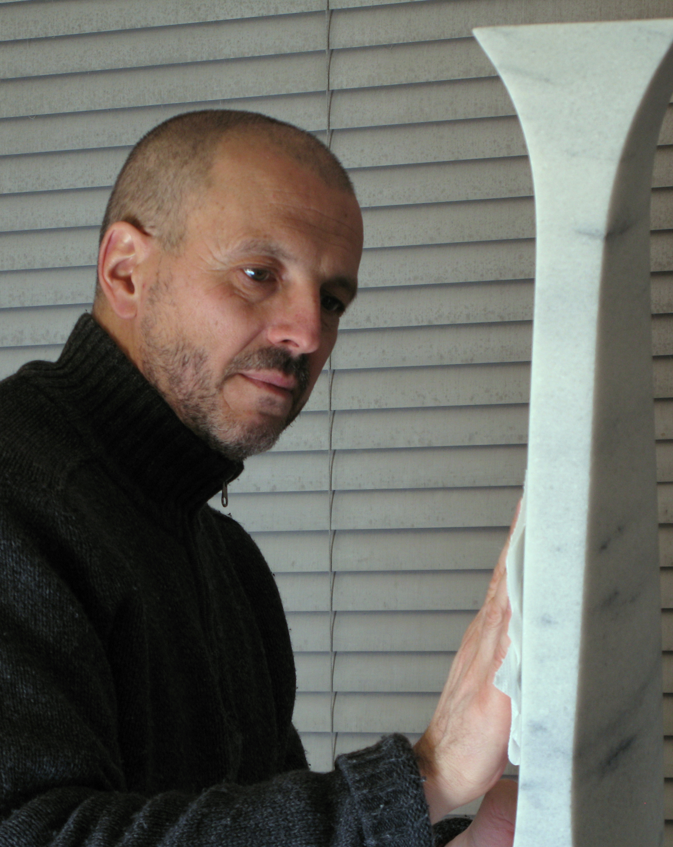 Porträt Jürgen Friede Ausschnitt, 2008